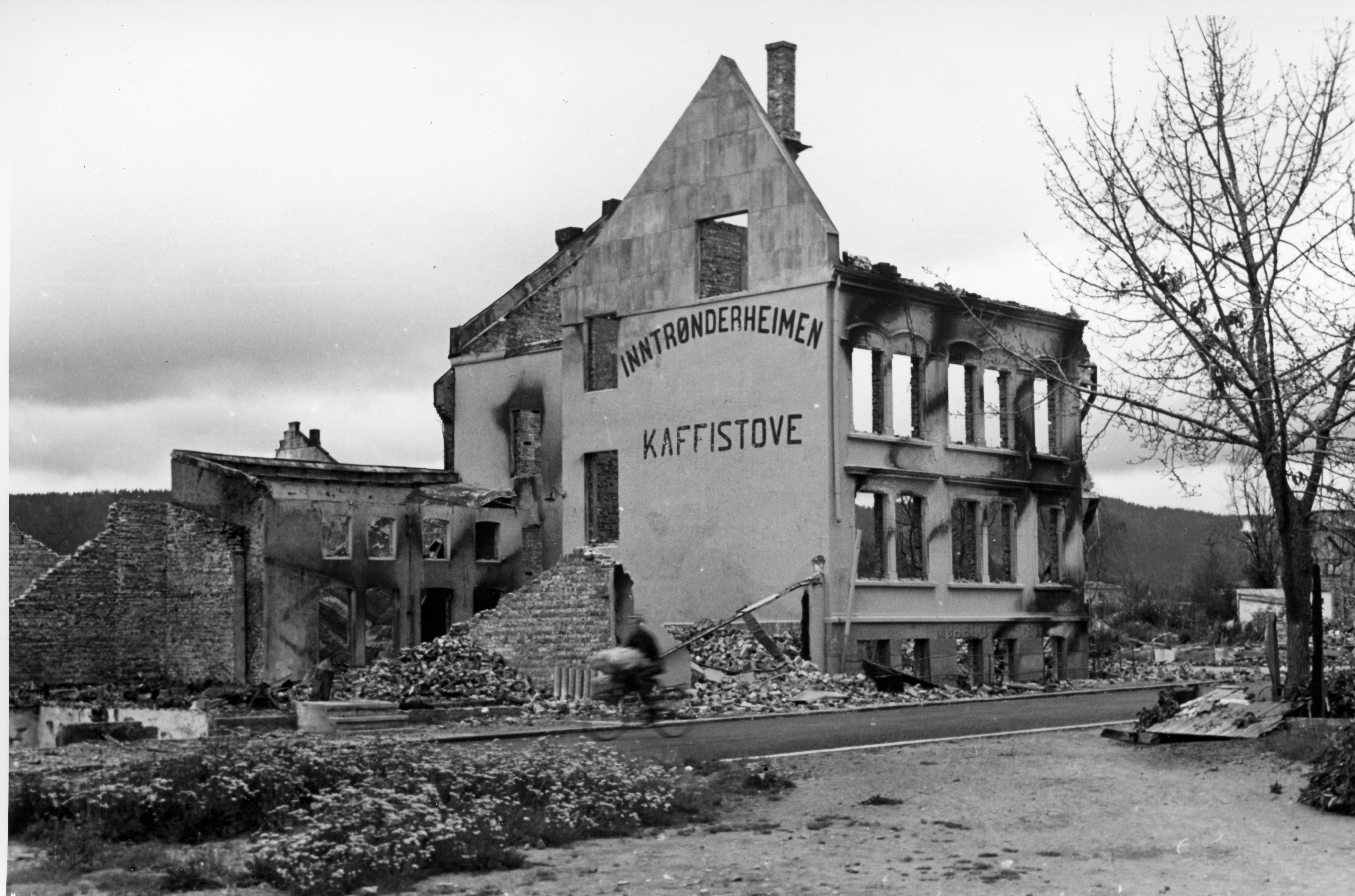 Bildet er hentet fra Arkivverket. Ødeleggelser i ukjent norsk by eller tettsted etter bombing våren 1940. Arkivinstitusjon : Riksarkivet Arkivnavn : Løken, Hallvard Sted : Norge, , , Emneord: 2. verdenskrig, Andre verdenskrig Avbildet